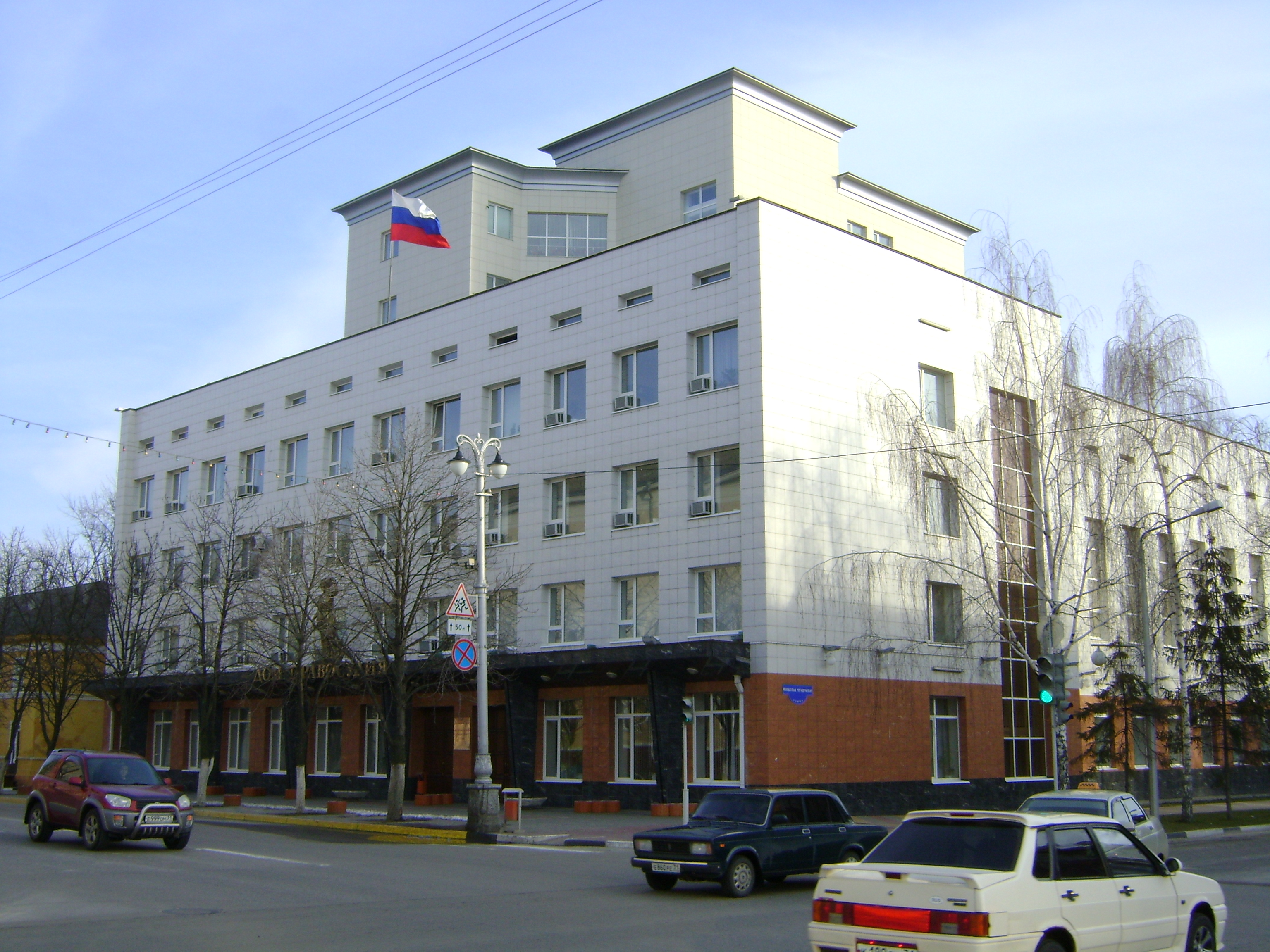 Белгородский областной суд